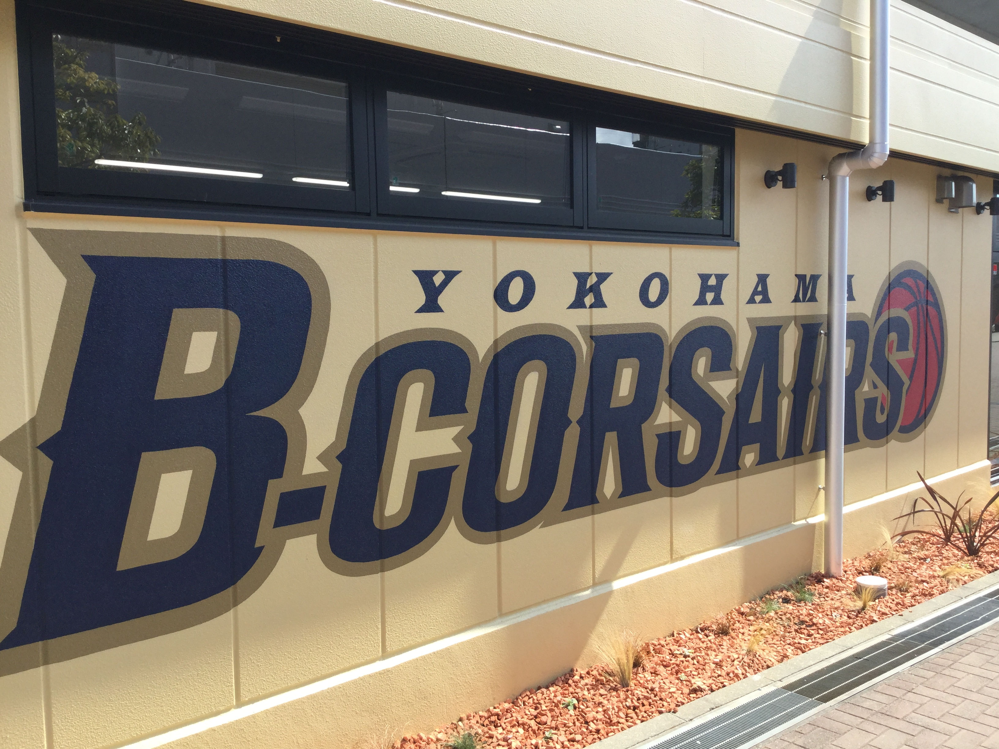 横浜ビー・コルセアーズの運営事務局として、ビーコル情報の発信拠点